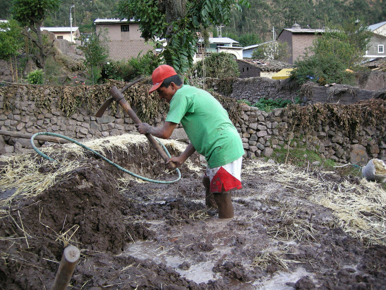 Mezcla de los ingredientes del adobe. Mischung der Grundstoffe der Adobe. Huancavélica, Perú.